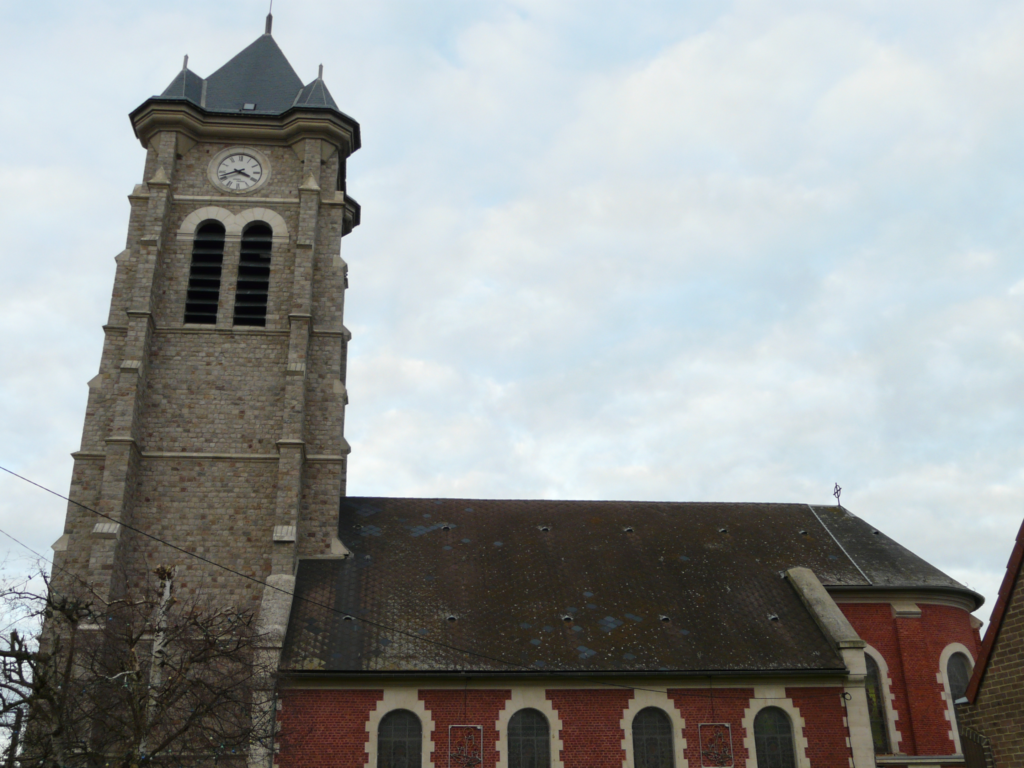 L'église de Fressies (Nord)